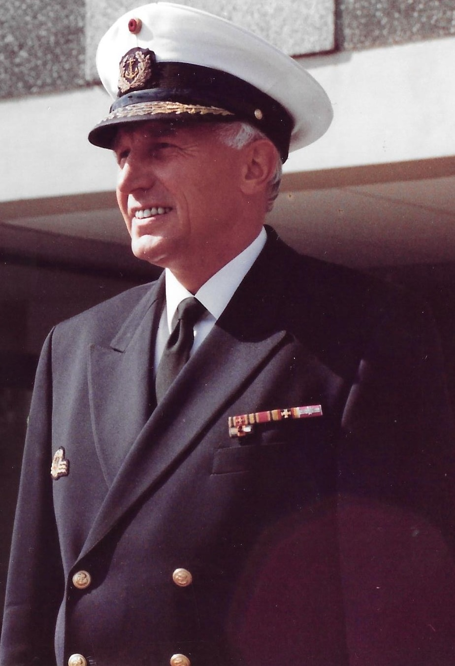 אדמירל גרמניה הנס-יואכים מאן מארח את אלוף מיכה רם יוני 1990